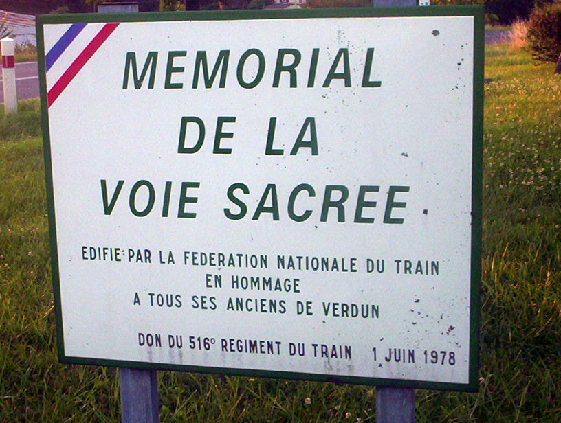 Mémorial de la Voie Sacrée Édifié par la Fédération nationale du Train en hommage à tous ses anciens de Verdun Don du 516° Régiment du Train - 1 Juin 1978